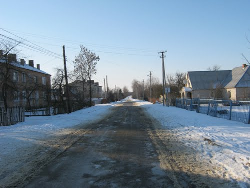 Центр села взимку